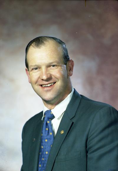 Senator Robert C. Ridder, 1971